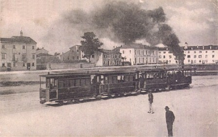 San Giovanni Lupatoto, piazza Corrrubbio prima della guerra.